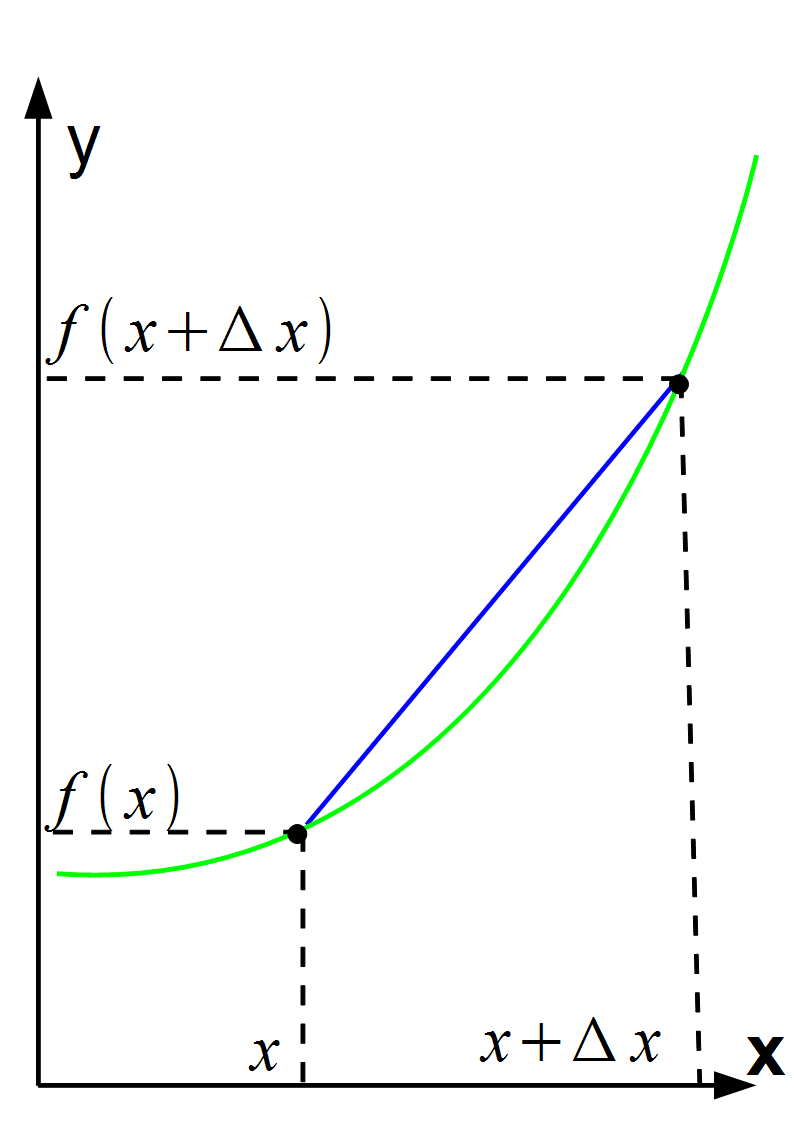 Bepaling van een afgeleide